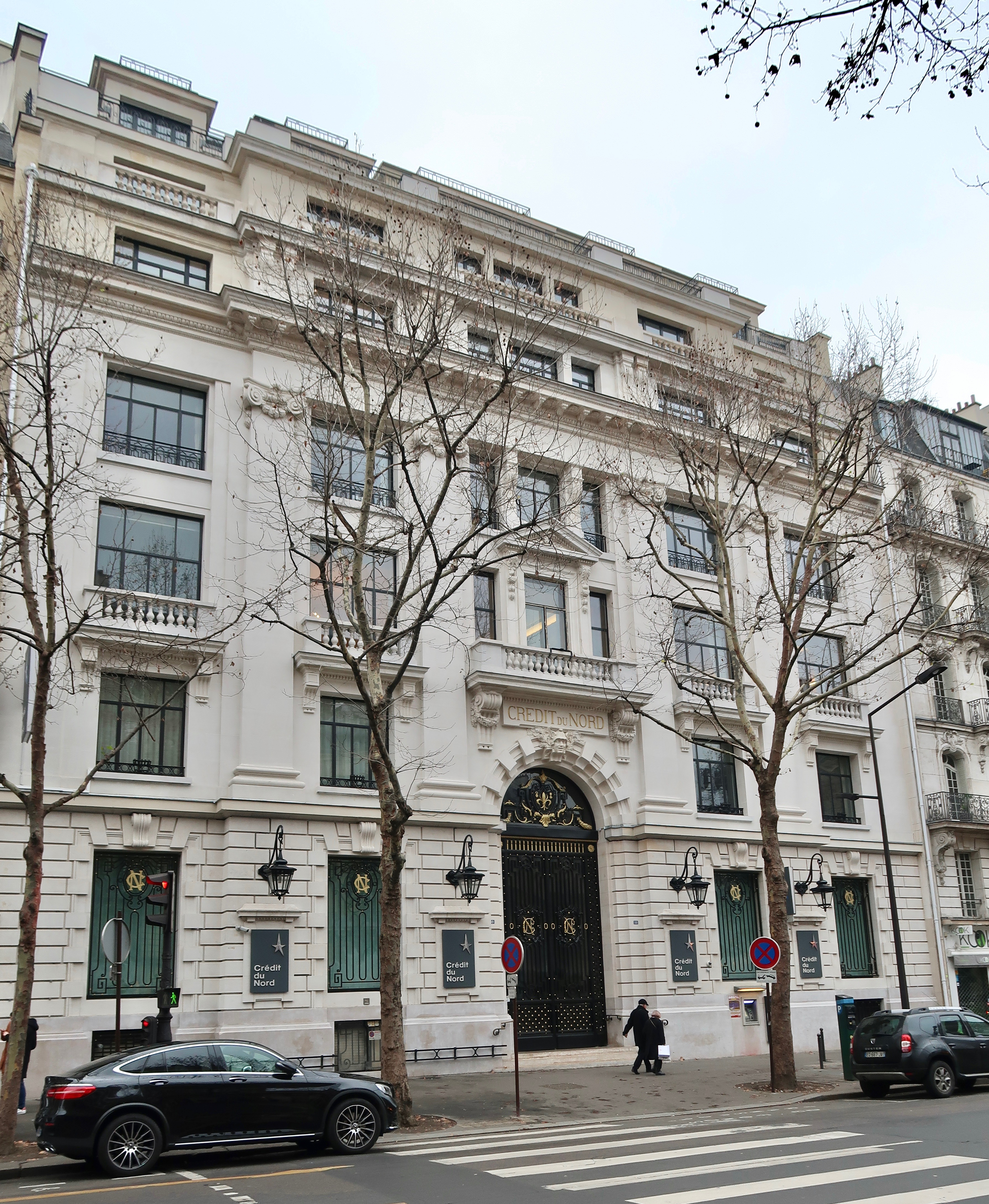 Crédit du Nord, 59 boulevard Haussmann (Paris, 8e).